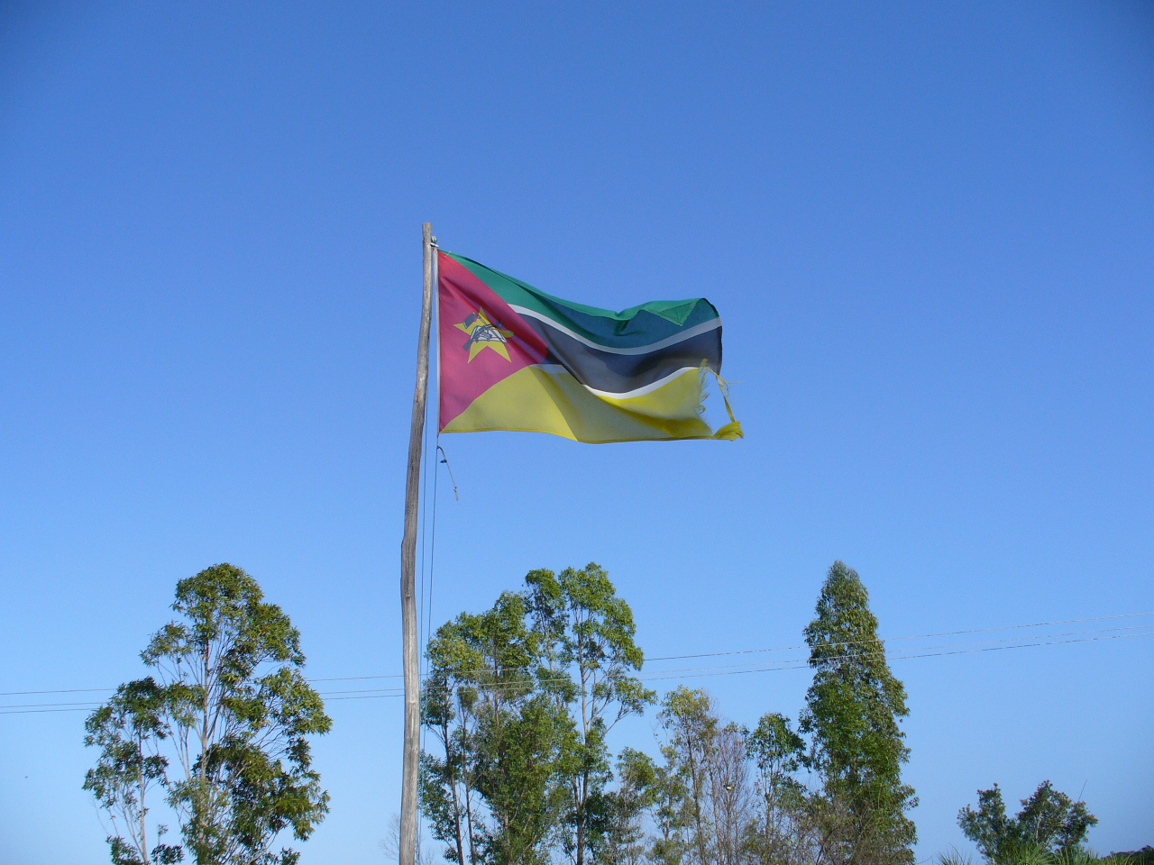 Bandeira de Mo�ambique